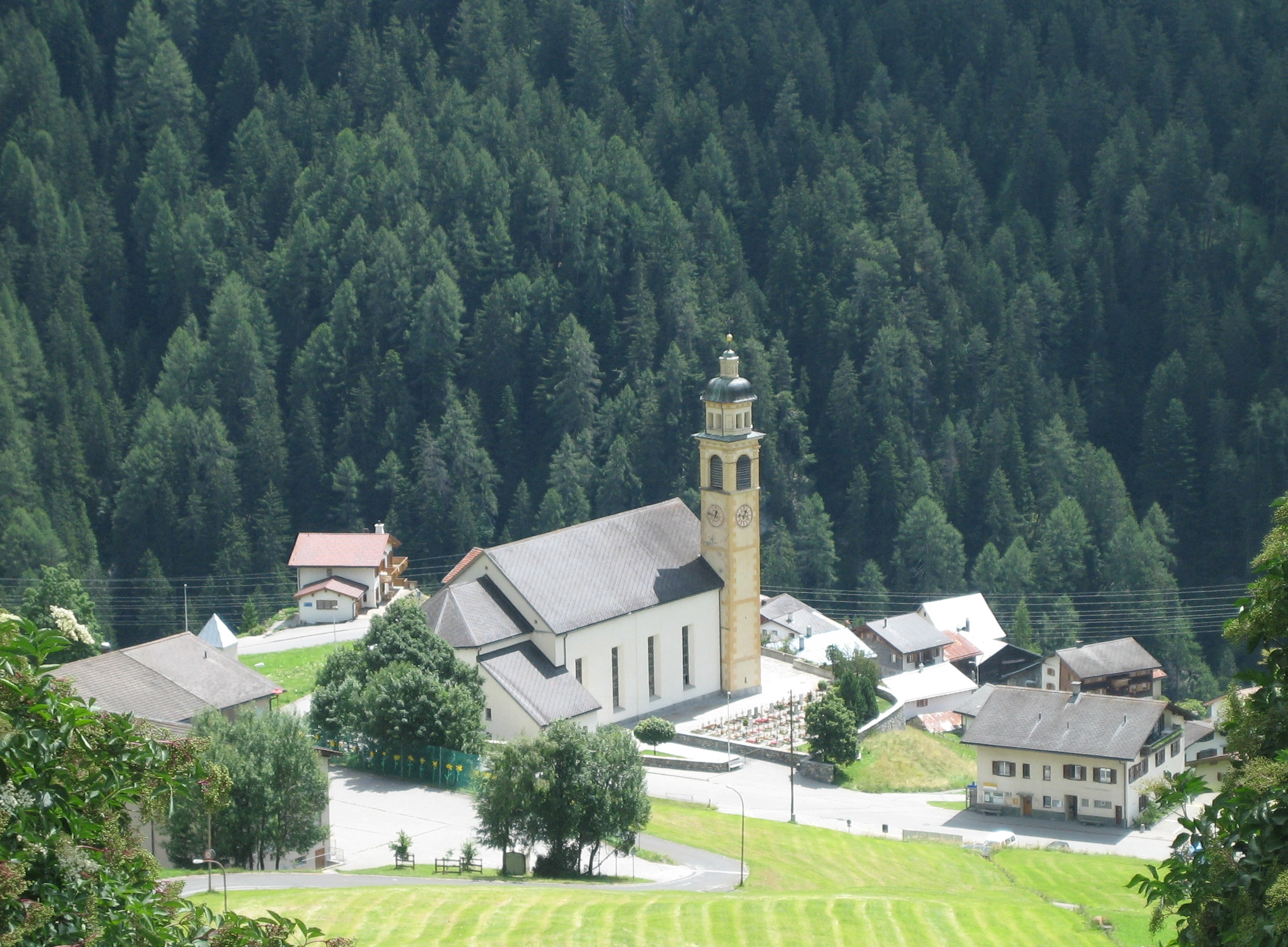 Zorten Kirche St. Donat